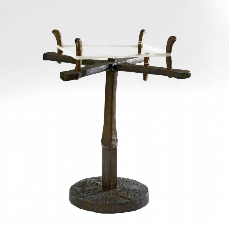 Garenafwinder. Er zijn verschillende soorten Batak garenafwinders. Om een ketting te maken wordt geverfd garen eerst gesteven. Het garen is dan in de vorm van strengen. Als het garen op het kettingtoestel wordt gewonden om een ketting te maken, werkt de weefster echter met kluwen garen. Om kluwens te maken is een garenafwinder nodig. De weefster haalt de streng gesteven garens van het stijvingsraam en hangt ze aan de garenafwinder. Vervolgens pakt de weefster het einde van het garen en wikkelt het om een klein stukje stof dat als kern van het kluwen zal dienen. Het kluwen houdt zij in haar linkerhand vast. Met haar rechterhand trekt zij aan het garen waardoor de vleugels van de garenafwinder om de spil draaien en het garen wordt afgewonden. Door middel van een garenafwinder kan een weefster snel haar klus afhandelen. De garenafwinder is ook nodig wanneer de weefster inslagdraad om de weefspoel wil wikkelen. De Batak weefspoel is een stukje bamboe met smalle doorsnede. De draad wordt gelijkmatig hier omheen gerold, vaak het werk van kinderen. Op fig. 114 in Jasper en Pirngadie (1912:128) zijn de twee kinderen bezig met het winden van weefspoelen. Zij gebruiken echter het garen van een kluwen. . Garenafwinder Unknown language: Panghulhulan